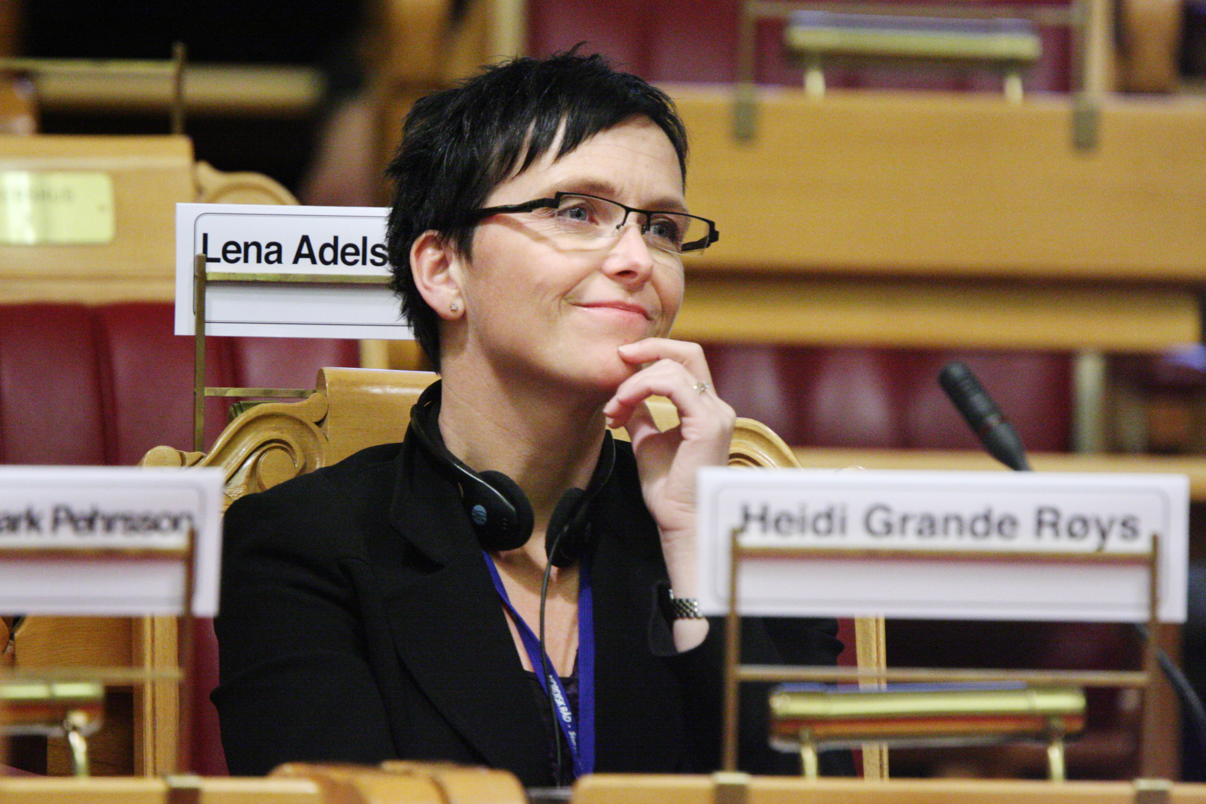 Norges samarbetsminister Heidi Grande Röys vid Nordiska Rådets session i Oslo. 2007-10-31. Foto: Magnus Fröderberg/norden.org